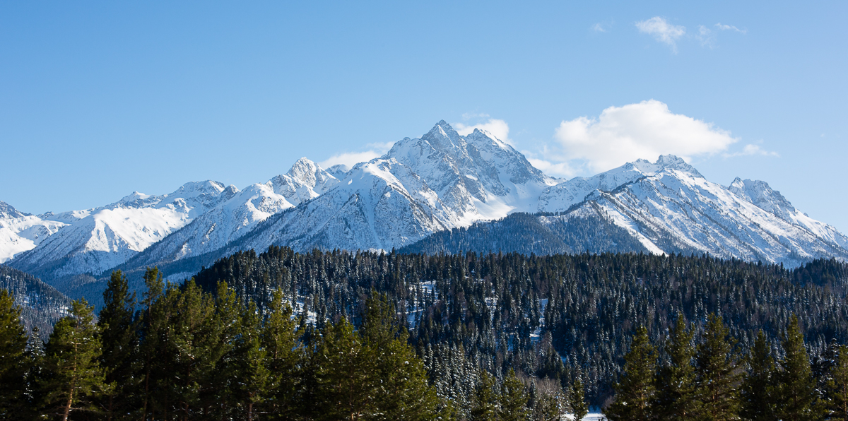 Остроконечная горная система Теберды This image is related to the protected area of Russia number 0900019